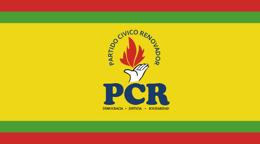 Bandera del Partido Cívico Renovador